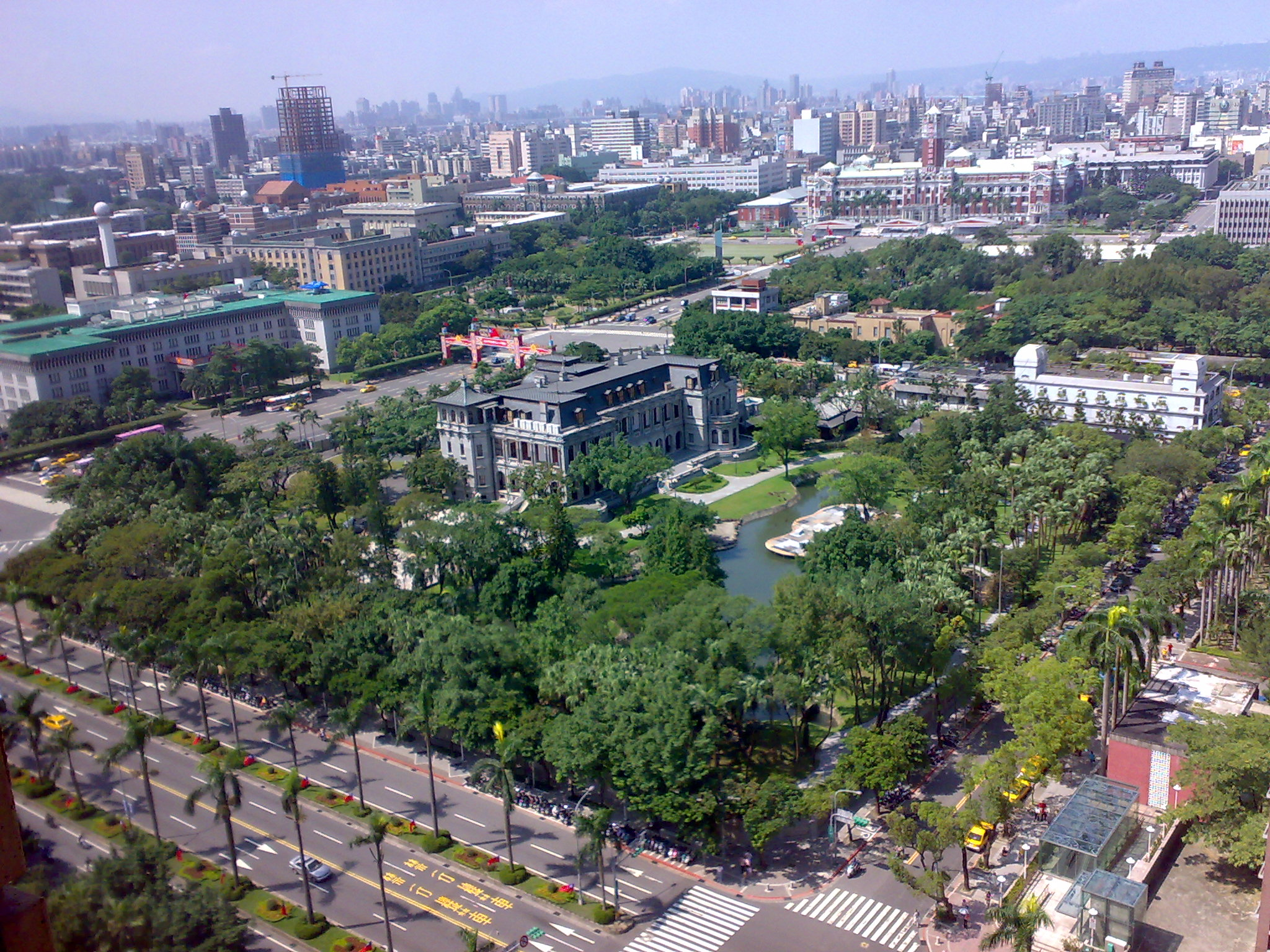 臺北賓館鳥瞰圖，攝於臺大醫院東院區15樓。